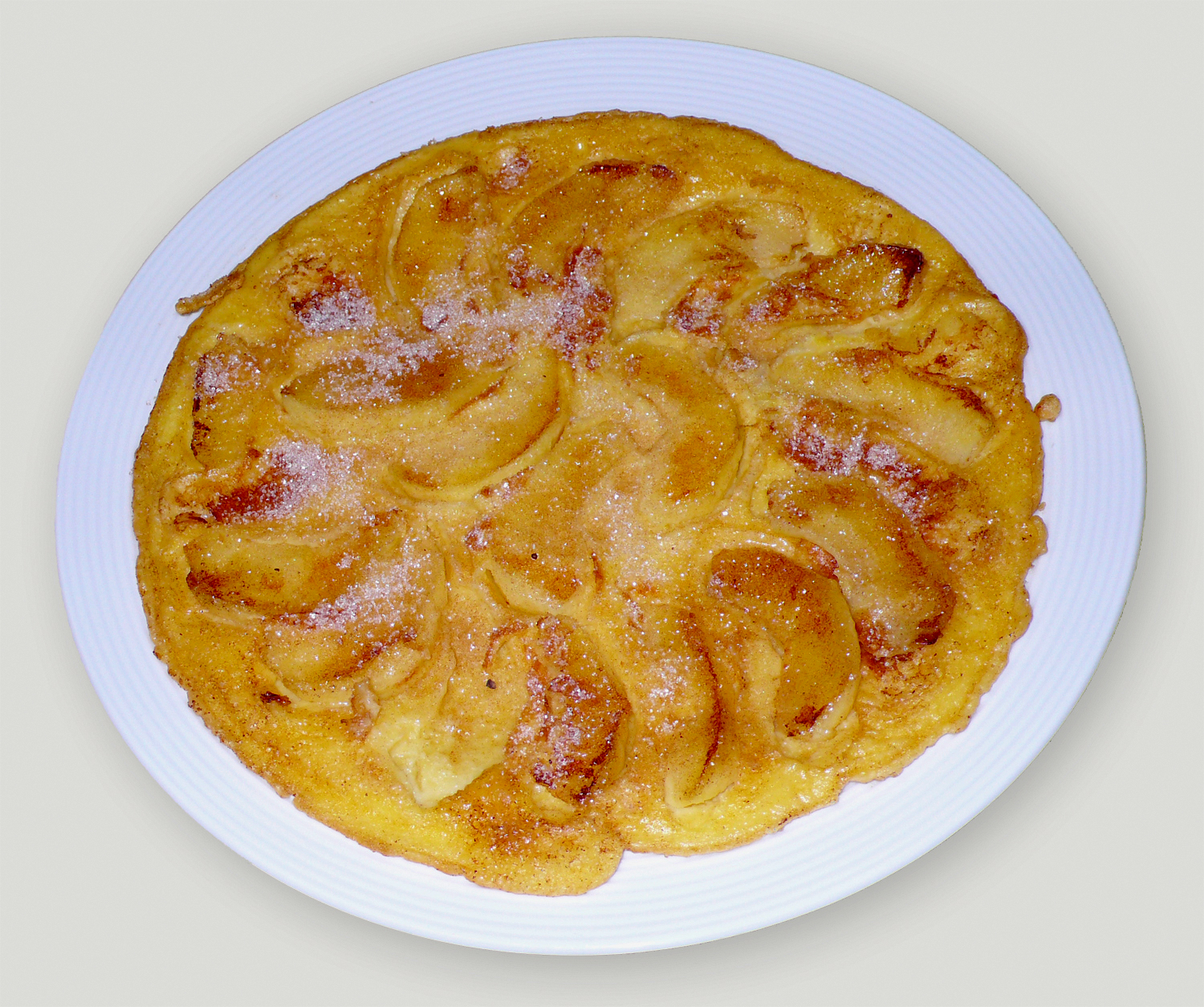 Apfelpfannkuchen